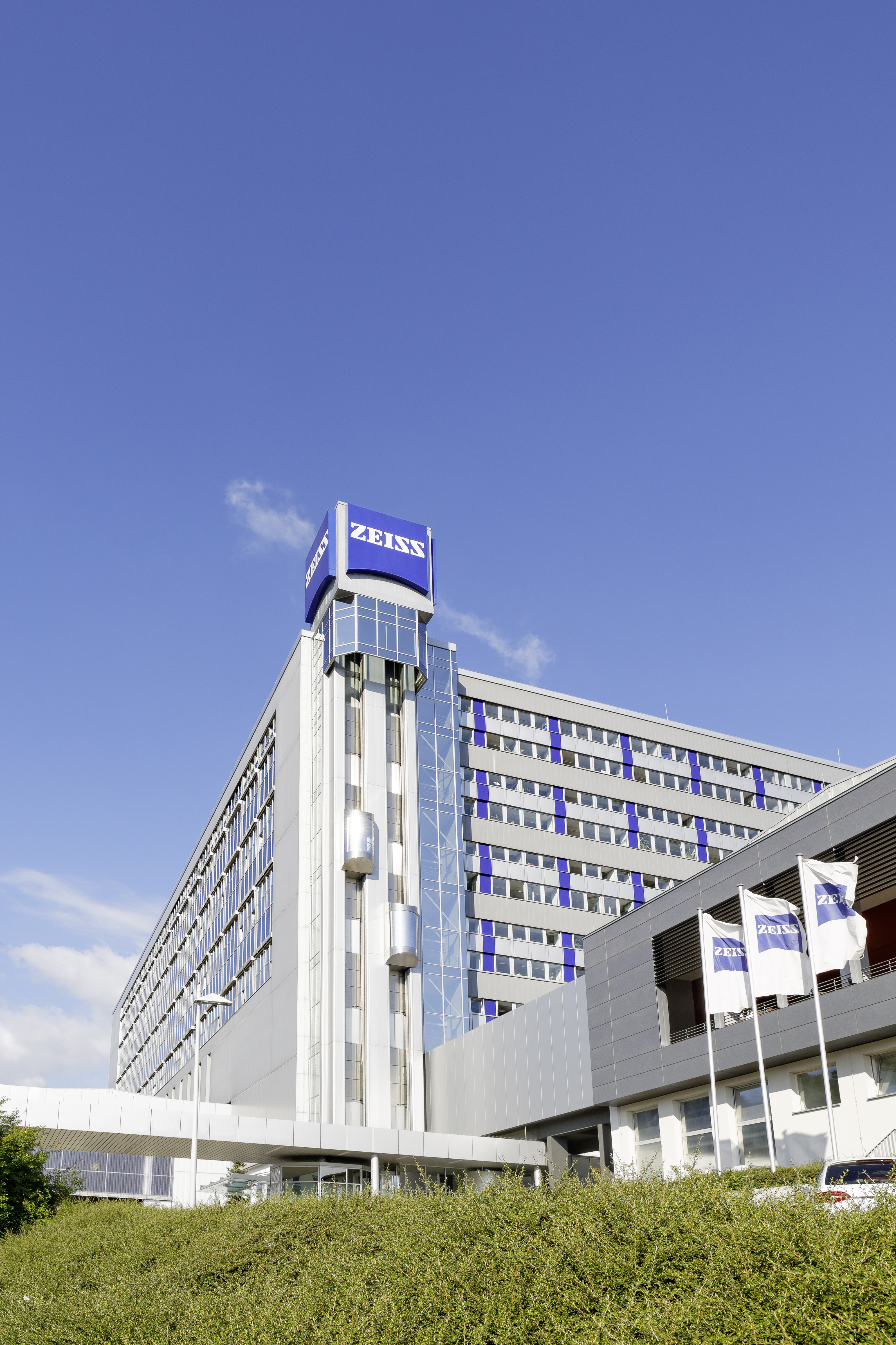 Центраката на Карл Цайс в Йена, Германия